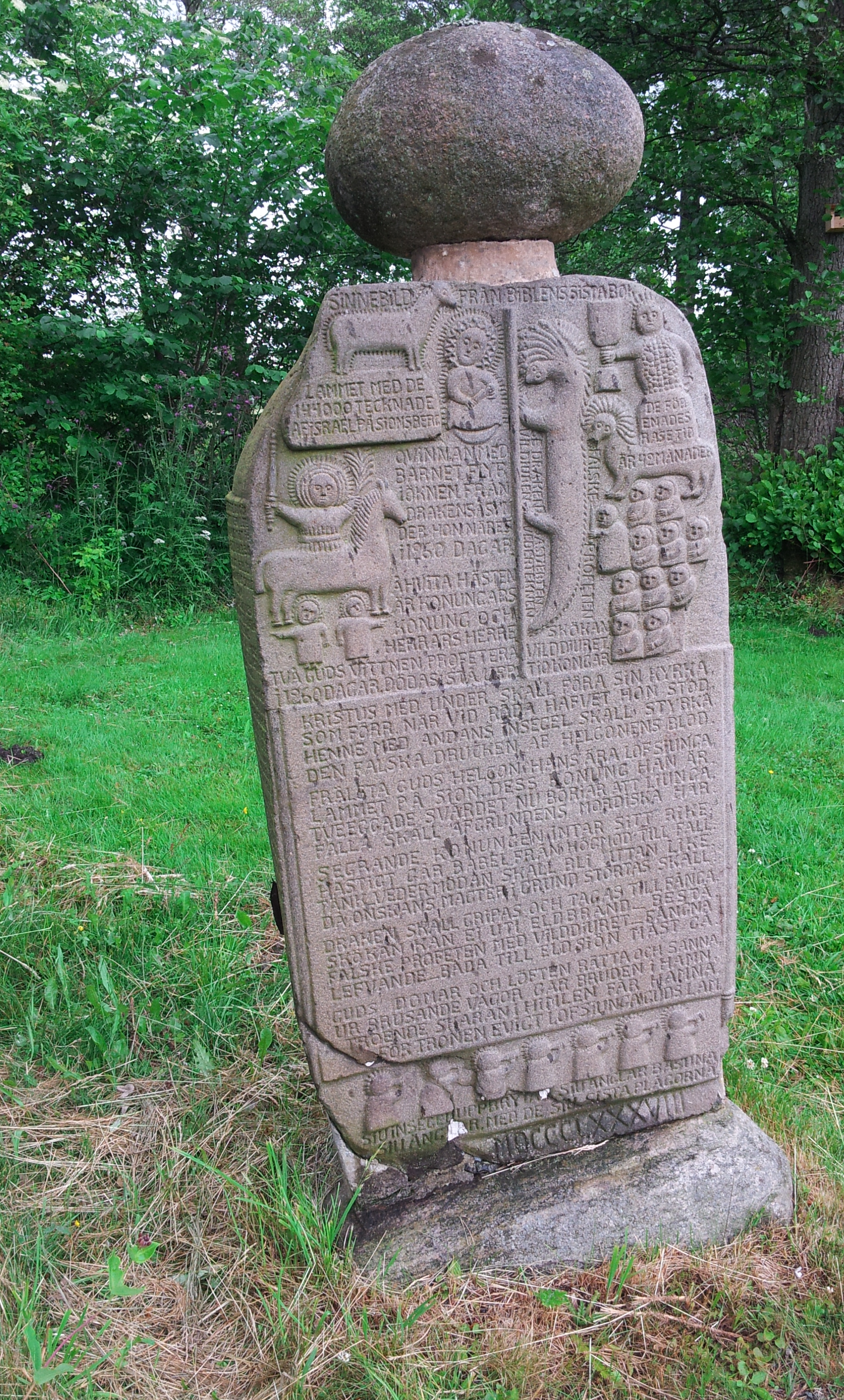 Hallsbergs stenar, hembygds- och lantbruksmuseum. Sjöbo, Lövestad